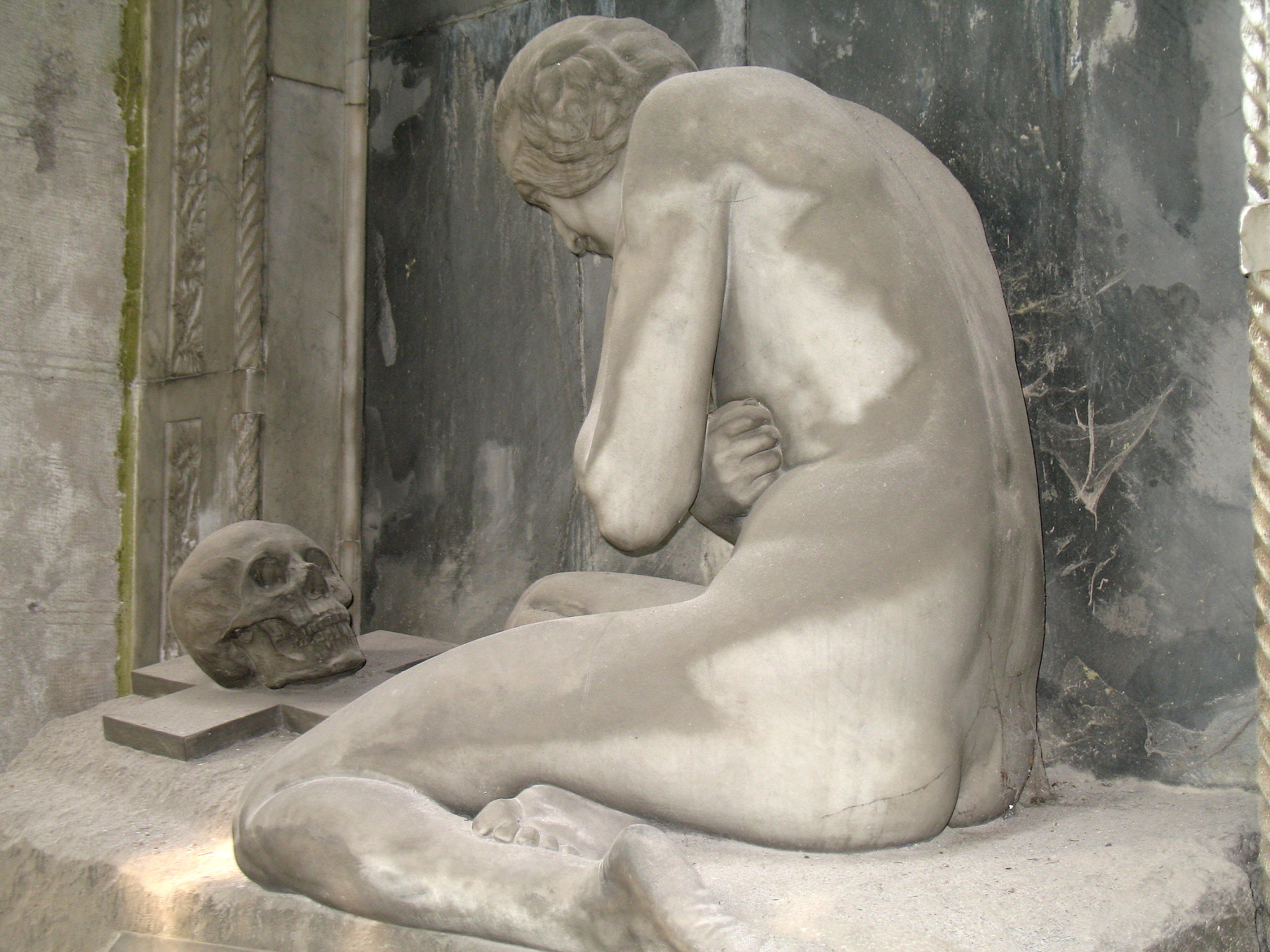 La tomba Lavarello, opera ultima, di gusto Simbolista, dello scultore Demetrio Paernio (Genova, 1851-1912) a Genova, nel Cimitero monumentale di Staglieno.